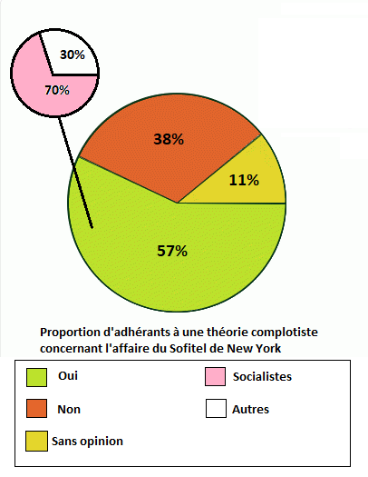 Diagramme représentant la proportion d’adhérents à une théorie complotiste relative à l'arrestation de Dominique Strauss-Kahn lors de l'affaire du Sofitel de New York.